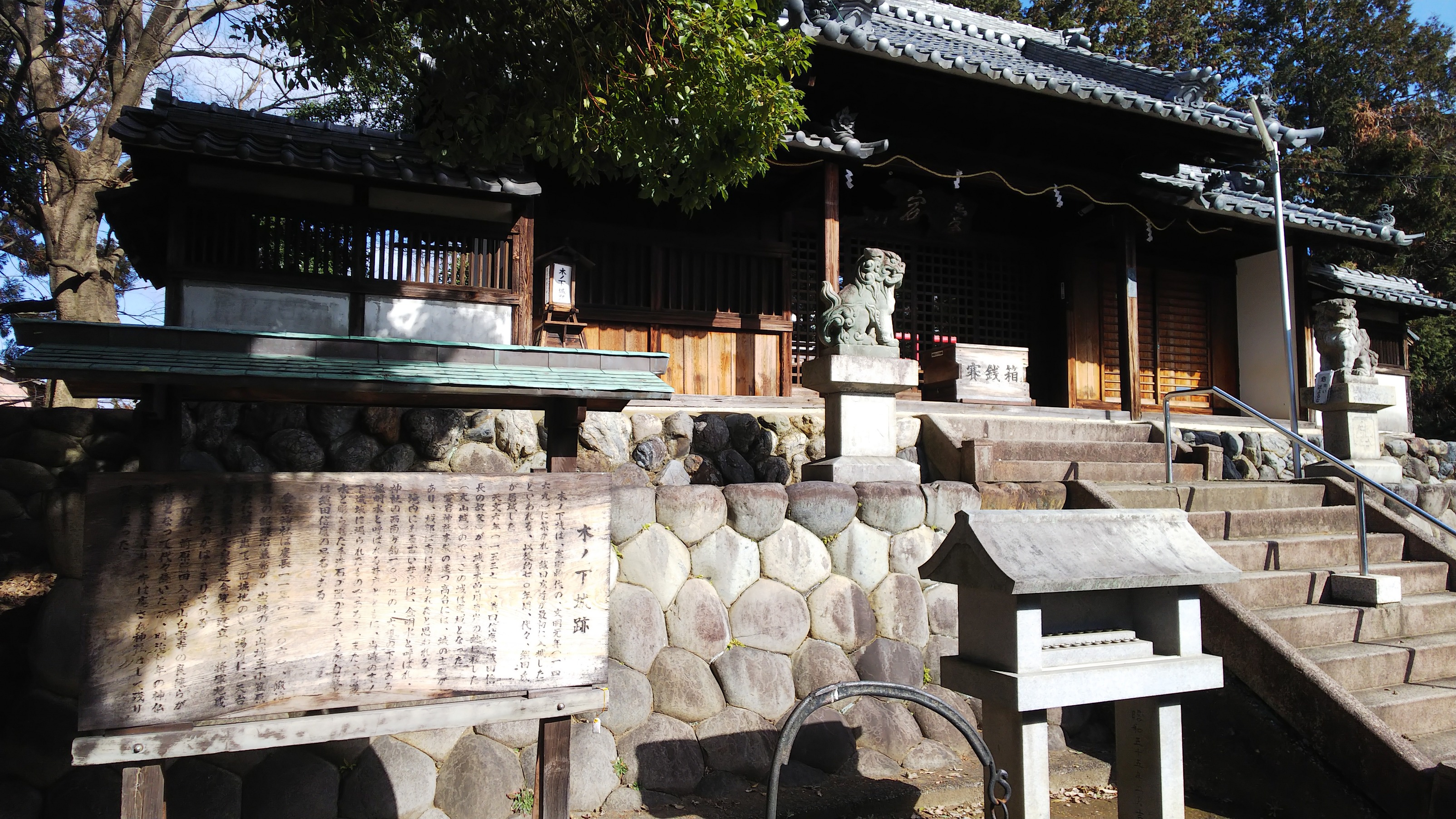 木ノ下城跡は現在愛宕神社